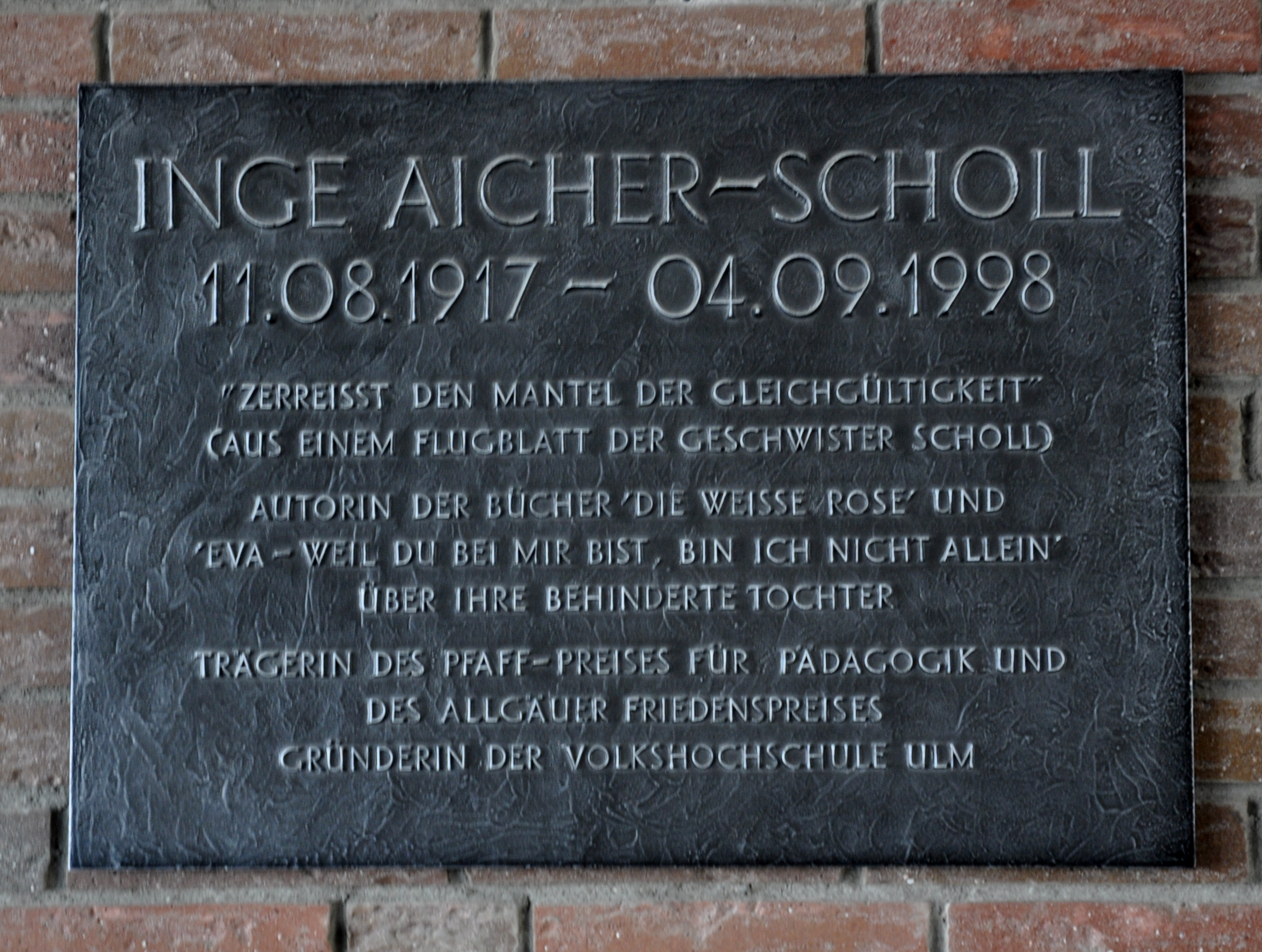 Weingarten (Württemberg), Geschwister-Scholl-Schule des KBZO , Gebäude der Grundstufe (Inge-Aicher-Scholl-Haus), Gedenktafel im Foyer